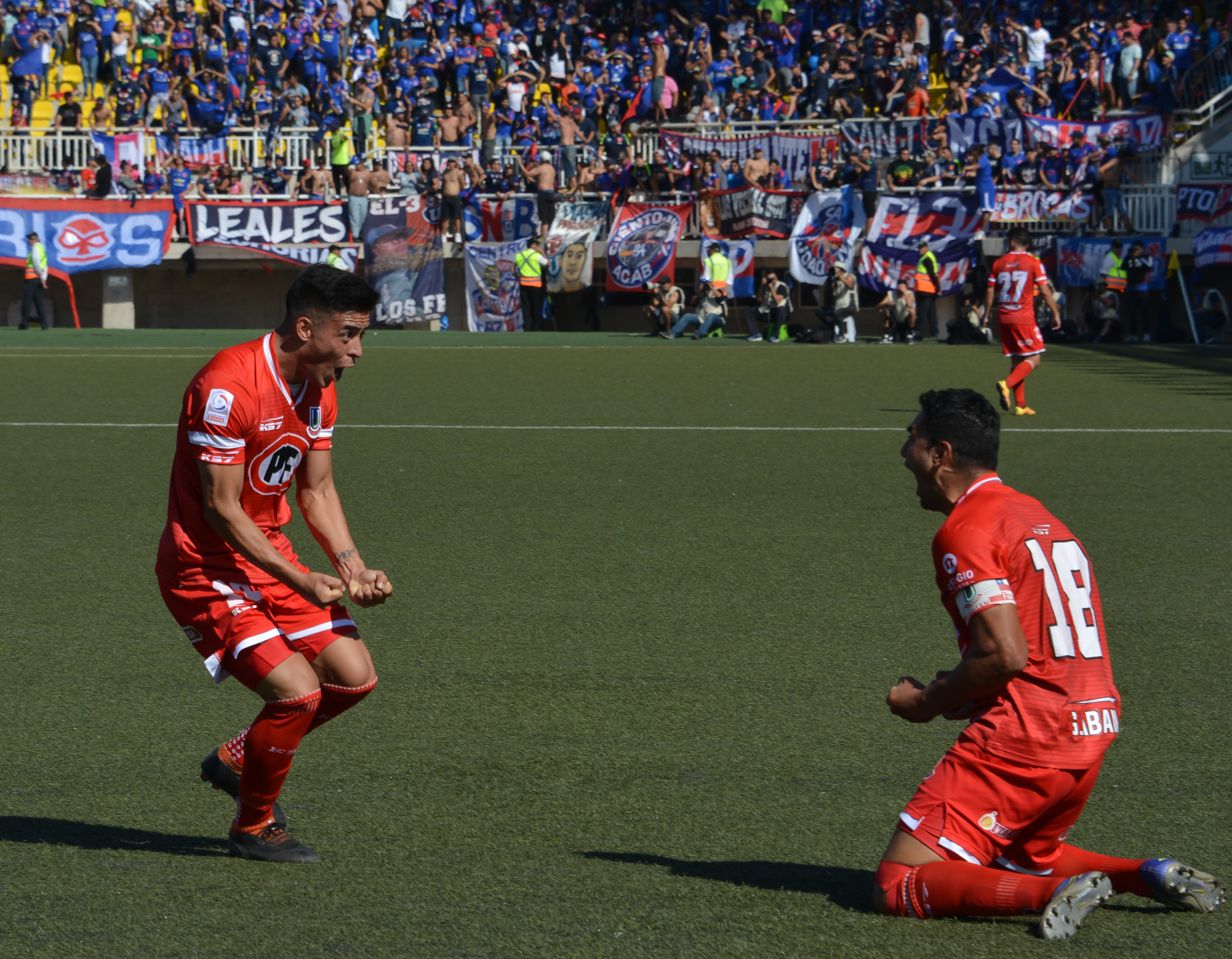 Unión La Calera v Universidad de Chile, Estadio Municipal Lucio Fariña Fernández, Quillota, Chile.